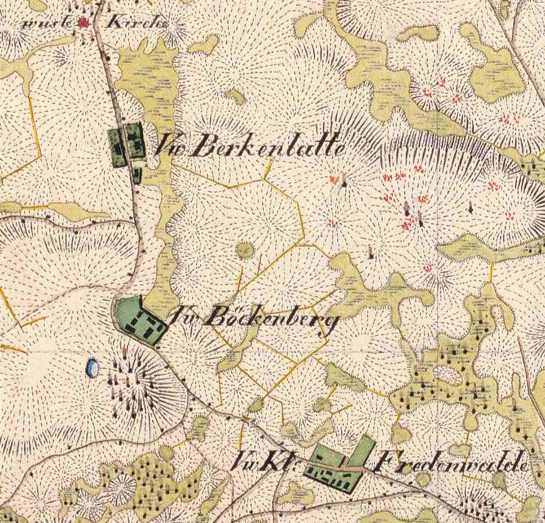 Böckenberg, Berkenlattem mit der wüsten Kirche und Klein-Fredenwalde, Gemeinde Gerswalde, Lkr. Uckermark, Brandenburg, Ausschnitt aus dem Urmesstischblatt 2848 Gerswalde von 1826